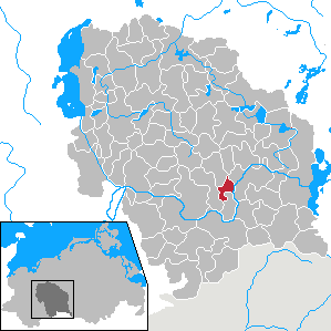 Lutheran in Mecklenburg-Vorpommern - District Parchim